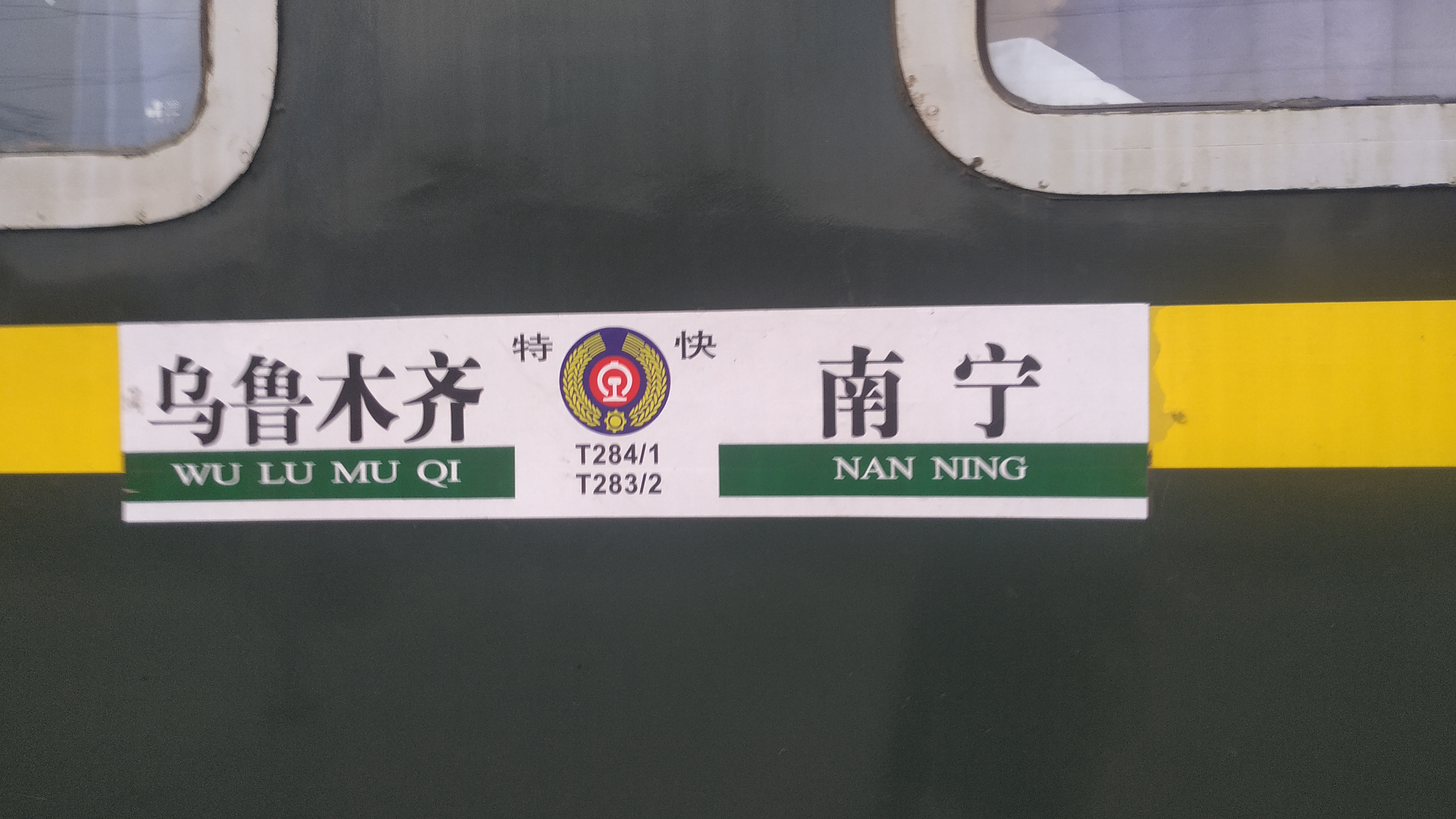 中文（中国大陆）: T283 乌鲁木齐到南宁